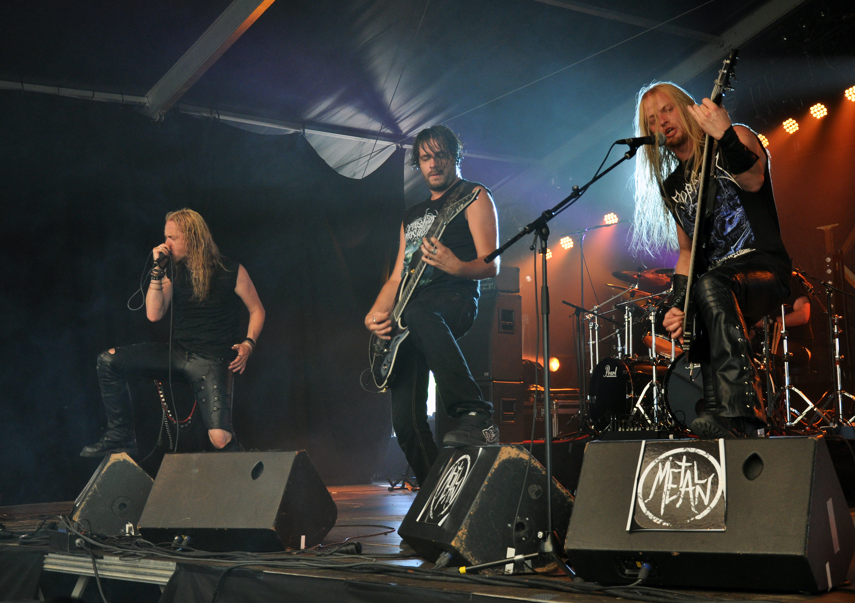 Keep of Kalessin au Metal Mean Festival, le 20 08 2011, à Méan (Bel).